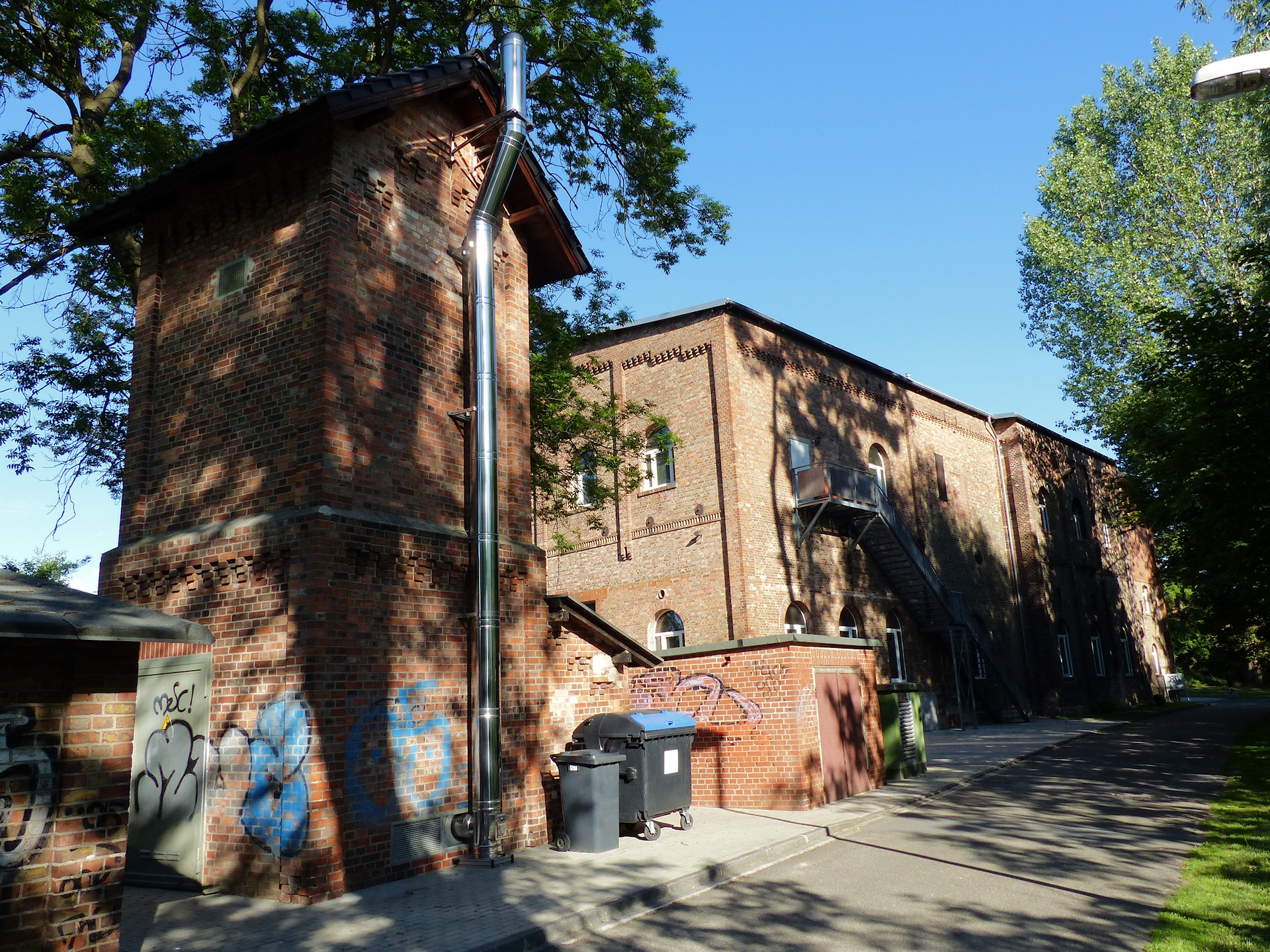 Ehemaliges Industriegelände (Zuckerfabrik) im Ortsteil Hedwigsburg, Ansicht vom Okerweg aus.